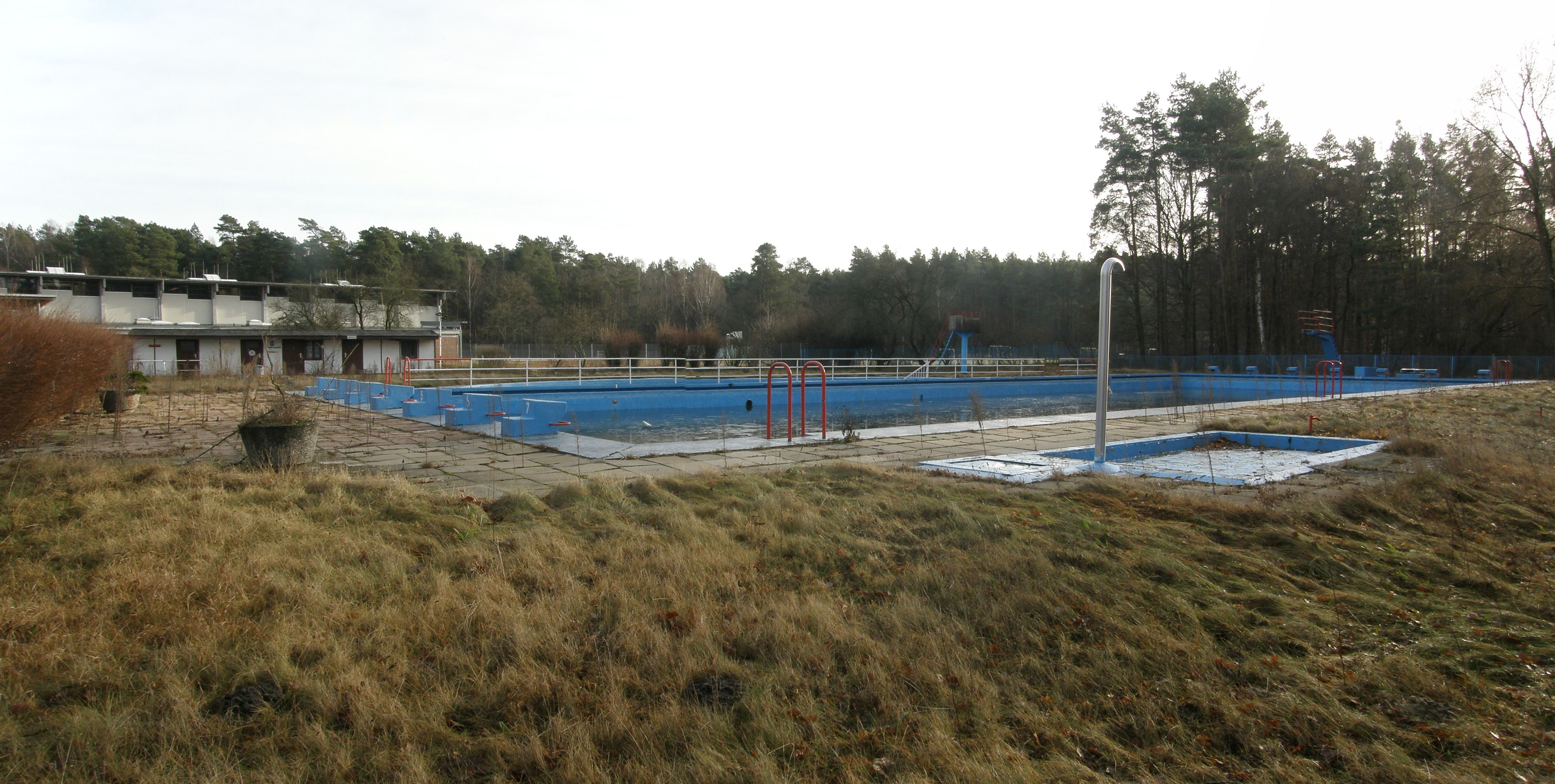 Bernau bei Berlin, Stadtteil Waldfrieden: Freibad gesamt